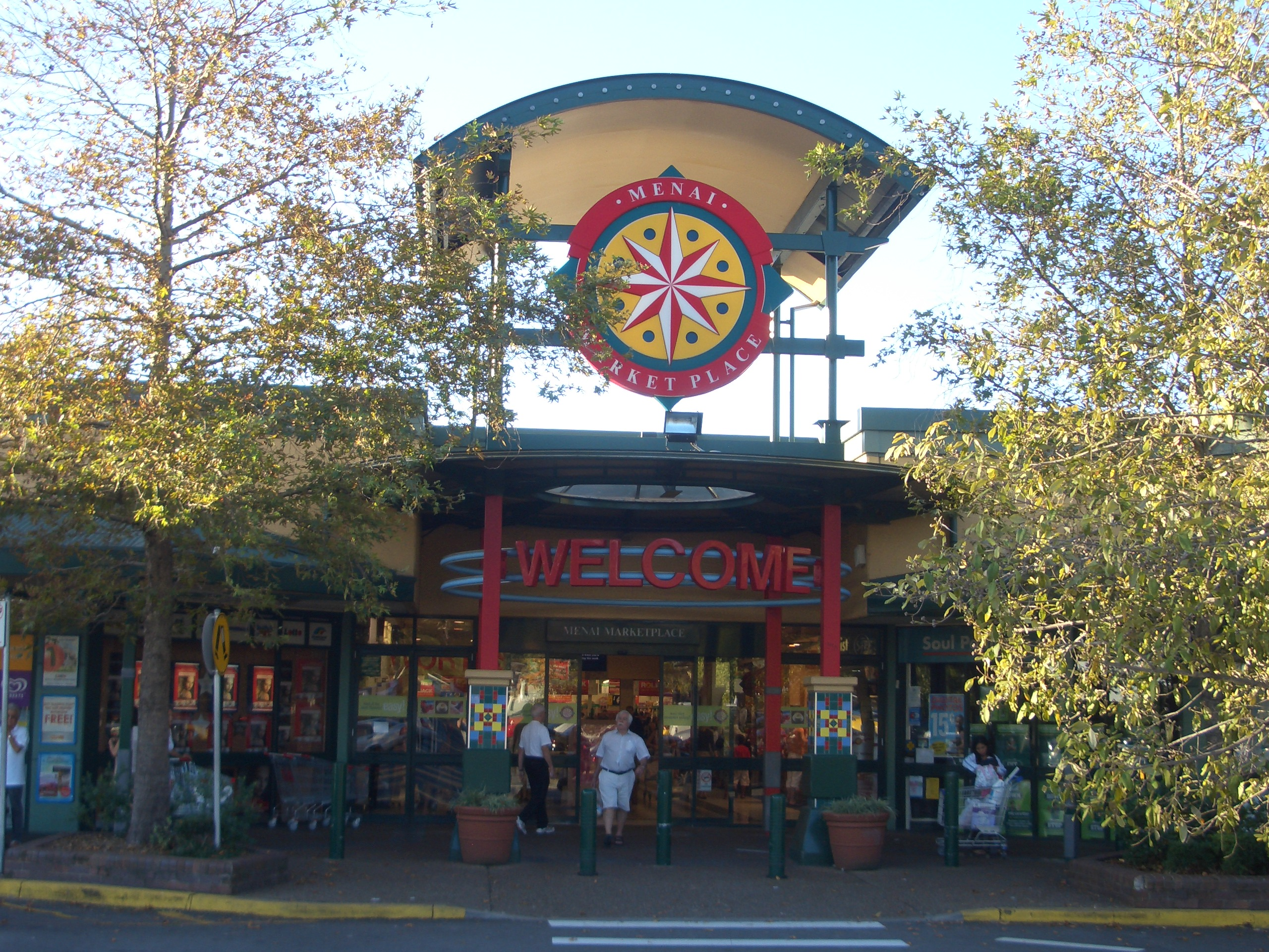 Menai Marketplace